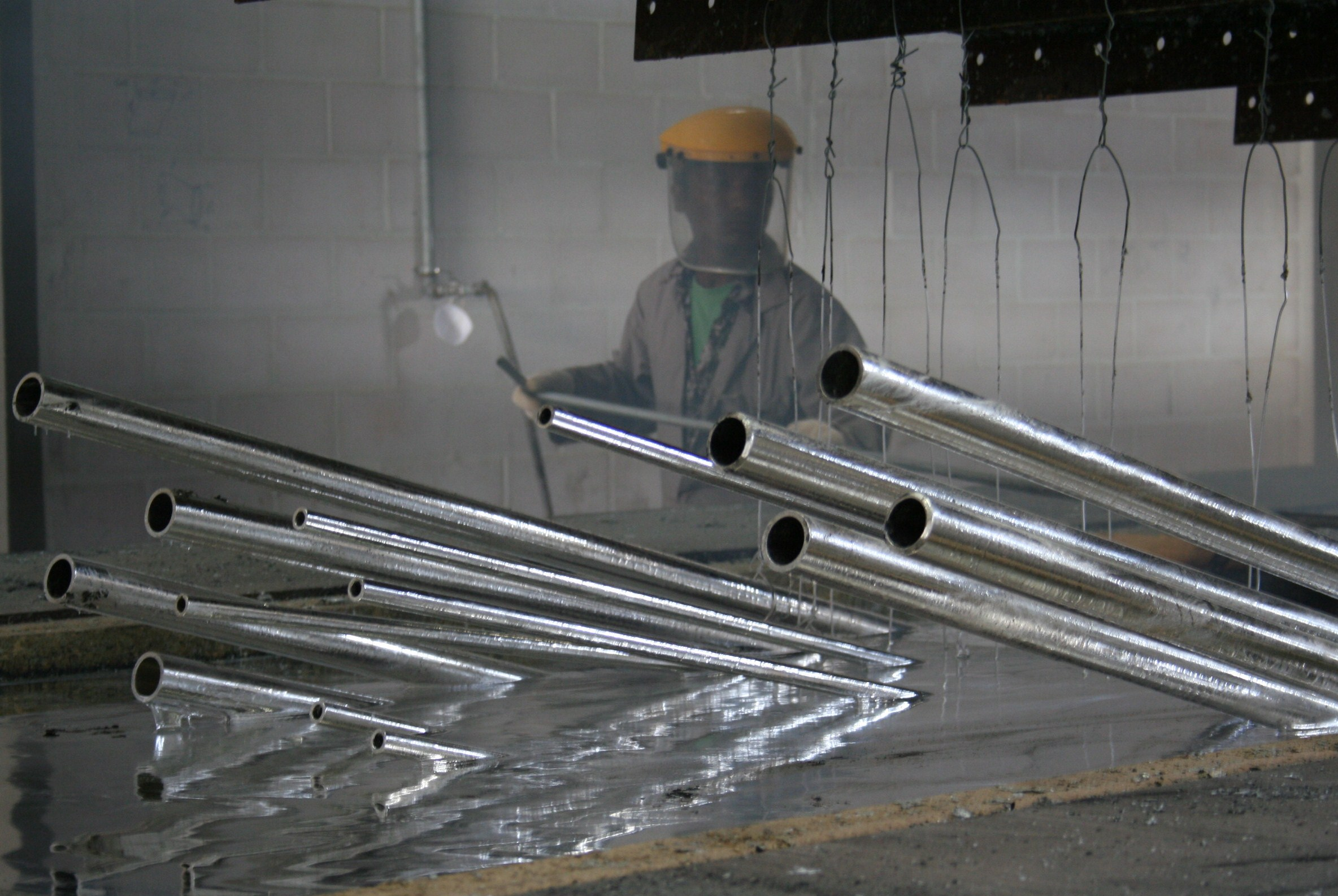 中文（香港）: Hot-dip galvanization process